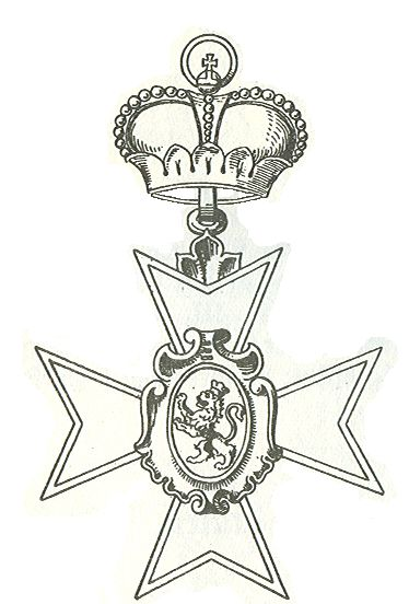 Erekruis der eerste klasse met kroon